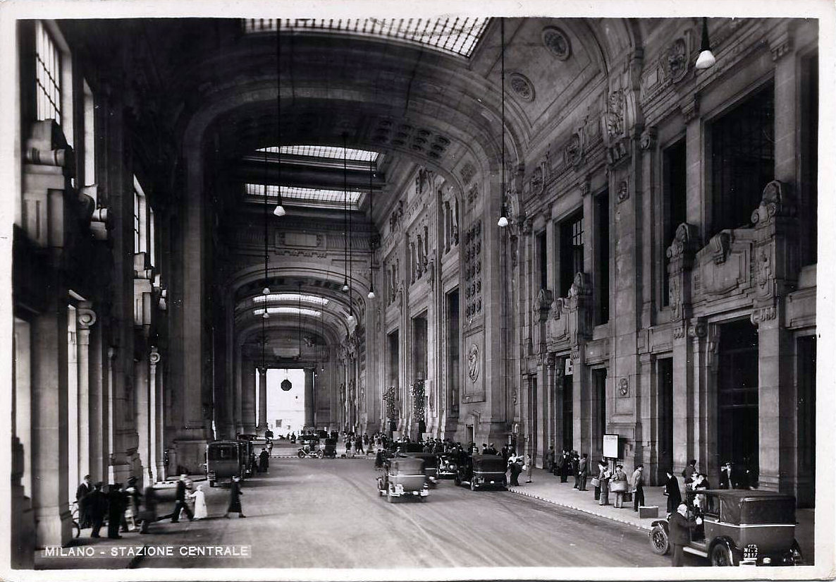 Milano, la Galleria delle Carrozze (Stazione Centrale) negli anni Trenta